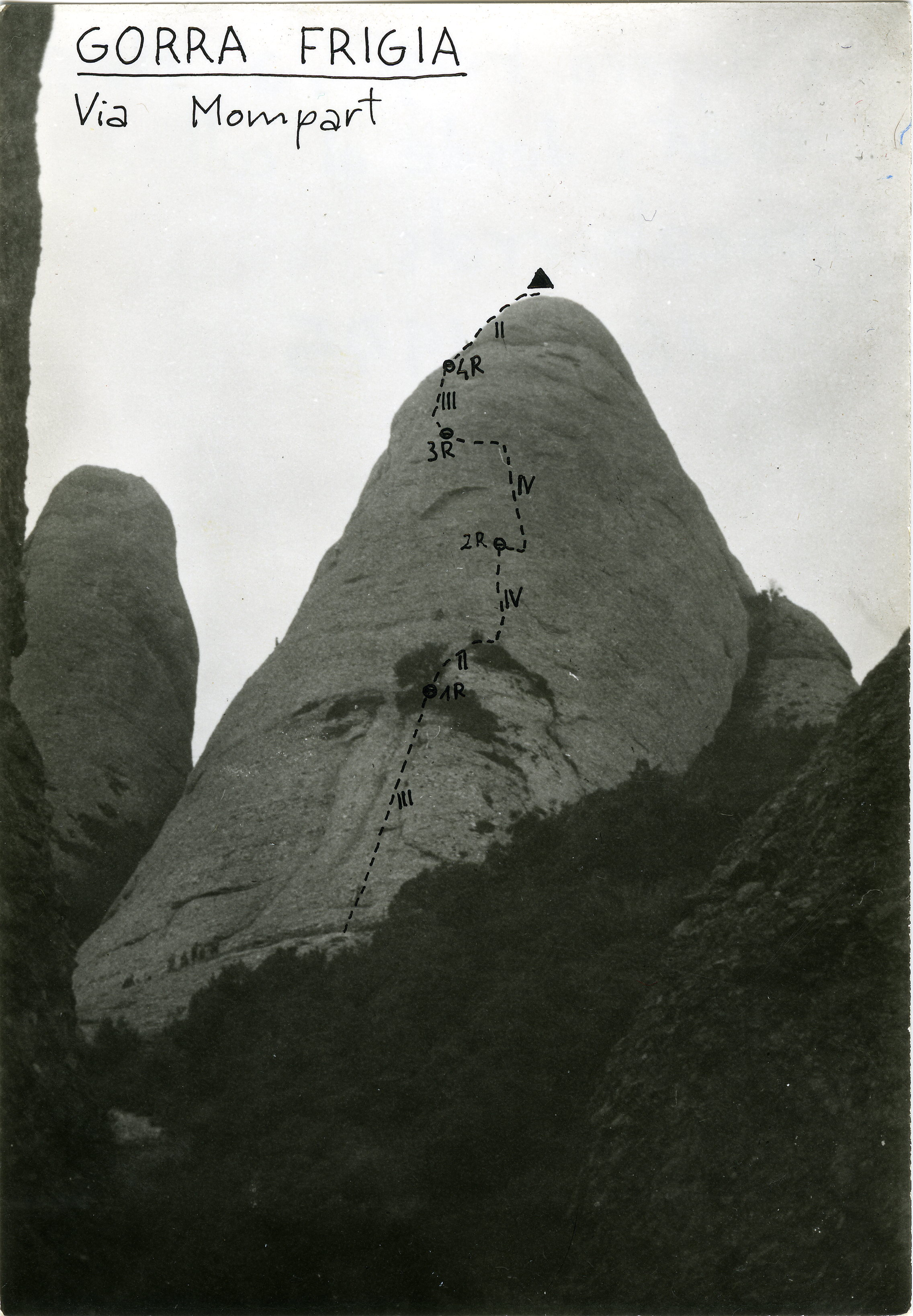 Ressenya de la via Mompart sobre foto de la Gorra Frígia presa des del Pas de Trencabarrals, Montserrat. Presa el 16 de novembre de 1975.